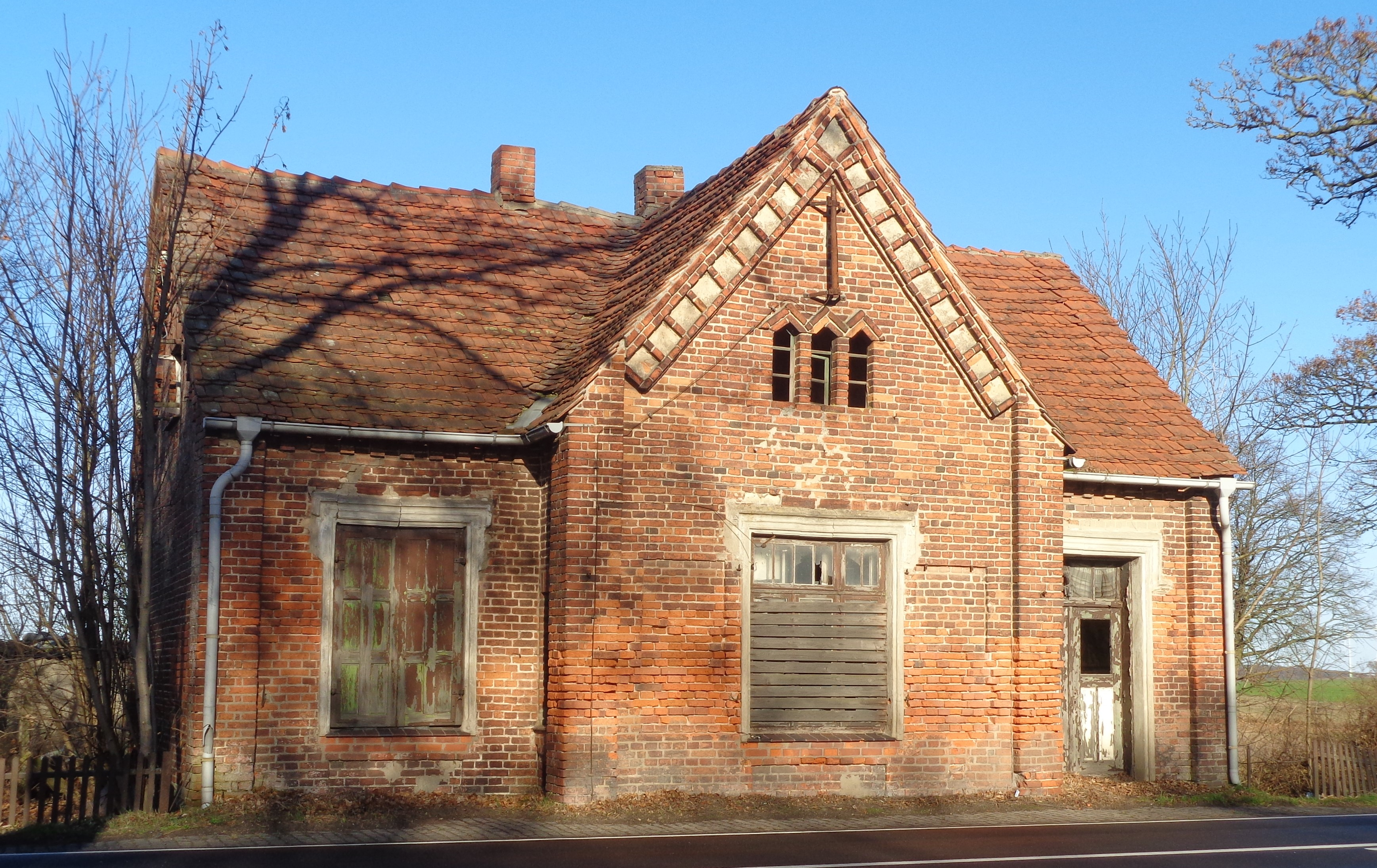 Verfallenes Chausseehaus in Mecklenburg an der Bundesstraße 191 zwischen Lutheran und Rom.